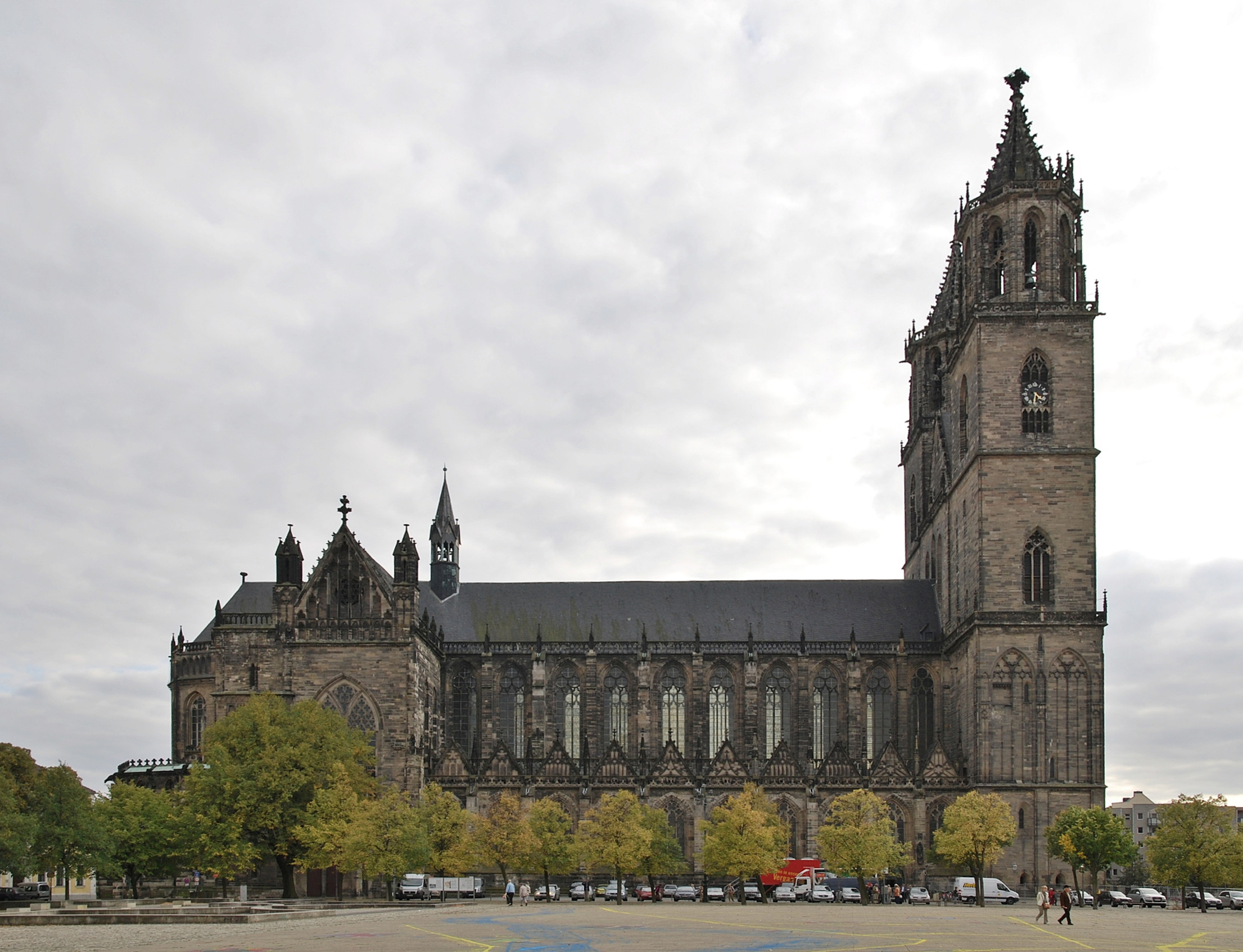 Der Dom zu Magdeburg von der Seite